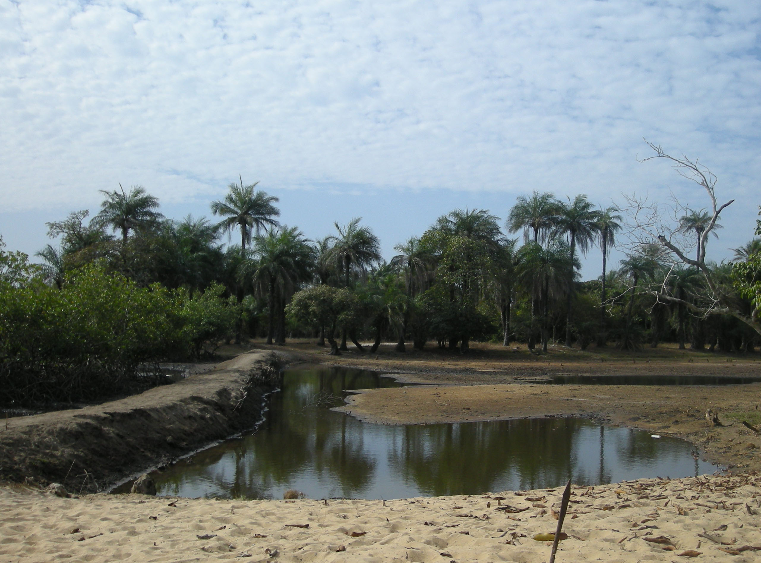 Petite digue à l'île de Carabane (Casamance, Sénégal), à proximité du cimetière